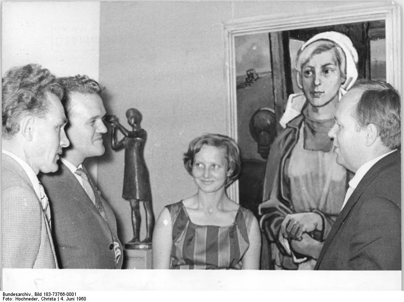 Zentralbild Hochneder 6.6.1960 II. Arbeiterfestspiele des FDGB im Bezirk Karl-Marx-Stadt. Am 4.6.1960 wurde im Städtischen Museum Karl-Marx-Stadt am Schloßplatz die Kunstausstellung mit über 1.600 Werken bildender Künstler und Laienschaffender anläßlich der II. Arbeiterfestspiele eröffnet, die die neuen sozialistischen Beziehungen zwischen Berufs- und Laienkünstlern in der DDR zum Ausdruck bringt. UBz: Der Maler Walter Womacka (rechts) diskutiert mit Besuchern über sein mit dem Kunstpreis des FDGB ausgezeichnetes Werk "Junge Genossenschaftsbäuerin".